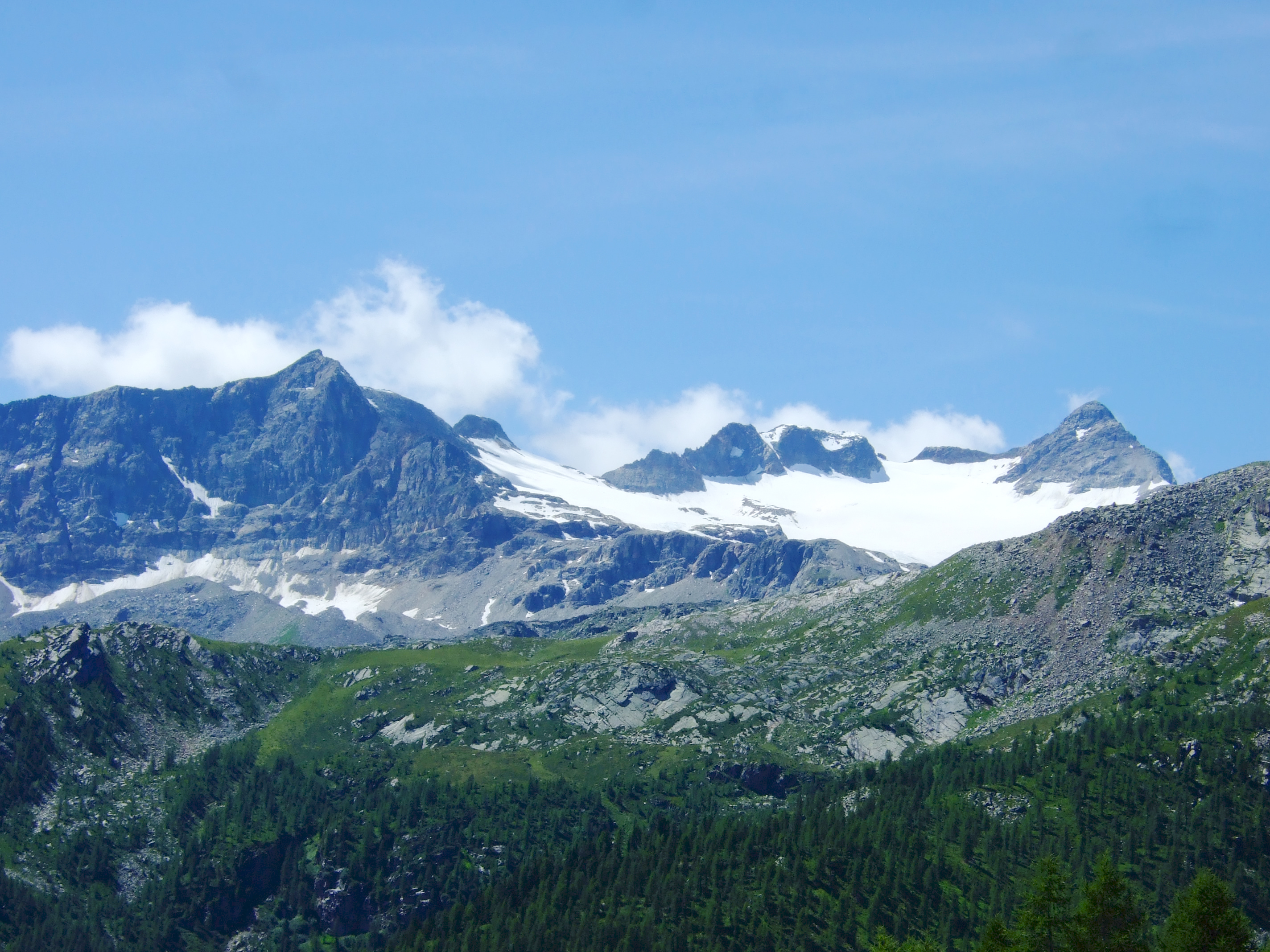 Pizzo Scalino und Piz Cancian mit Vedretta di Pizzo Scalino im August 2009 von Somdoss aus gesehen